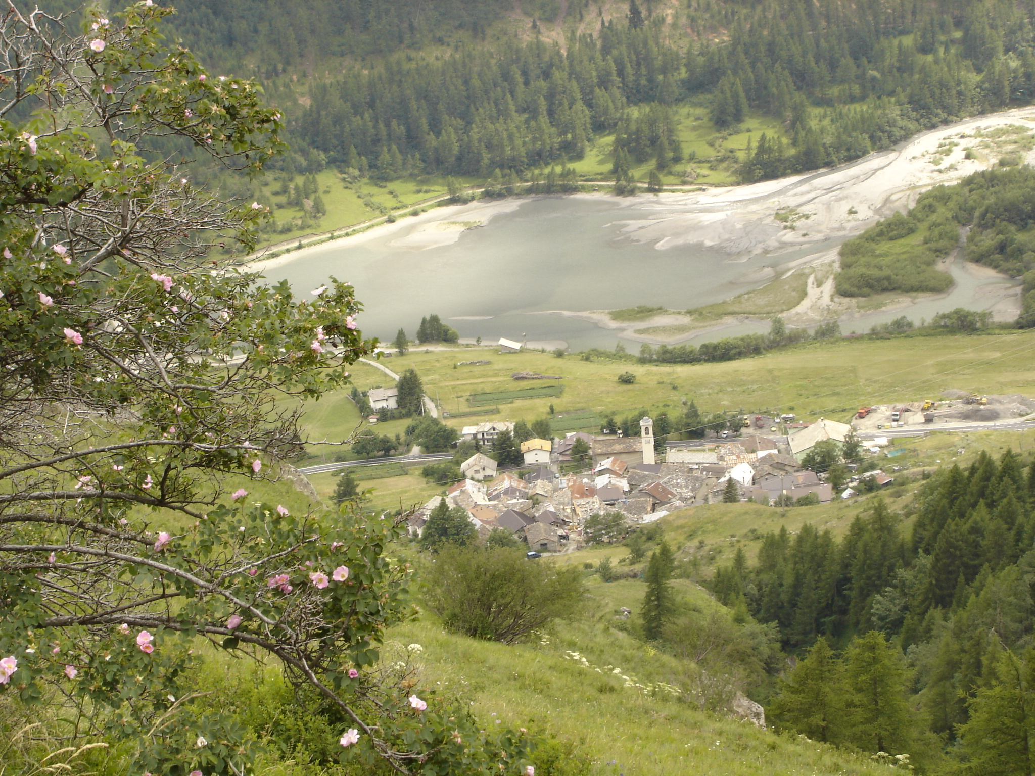 Le hameau de Pourrières, à Usseaux (Piémont)